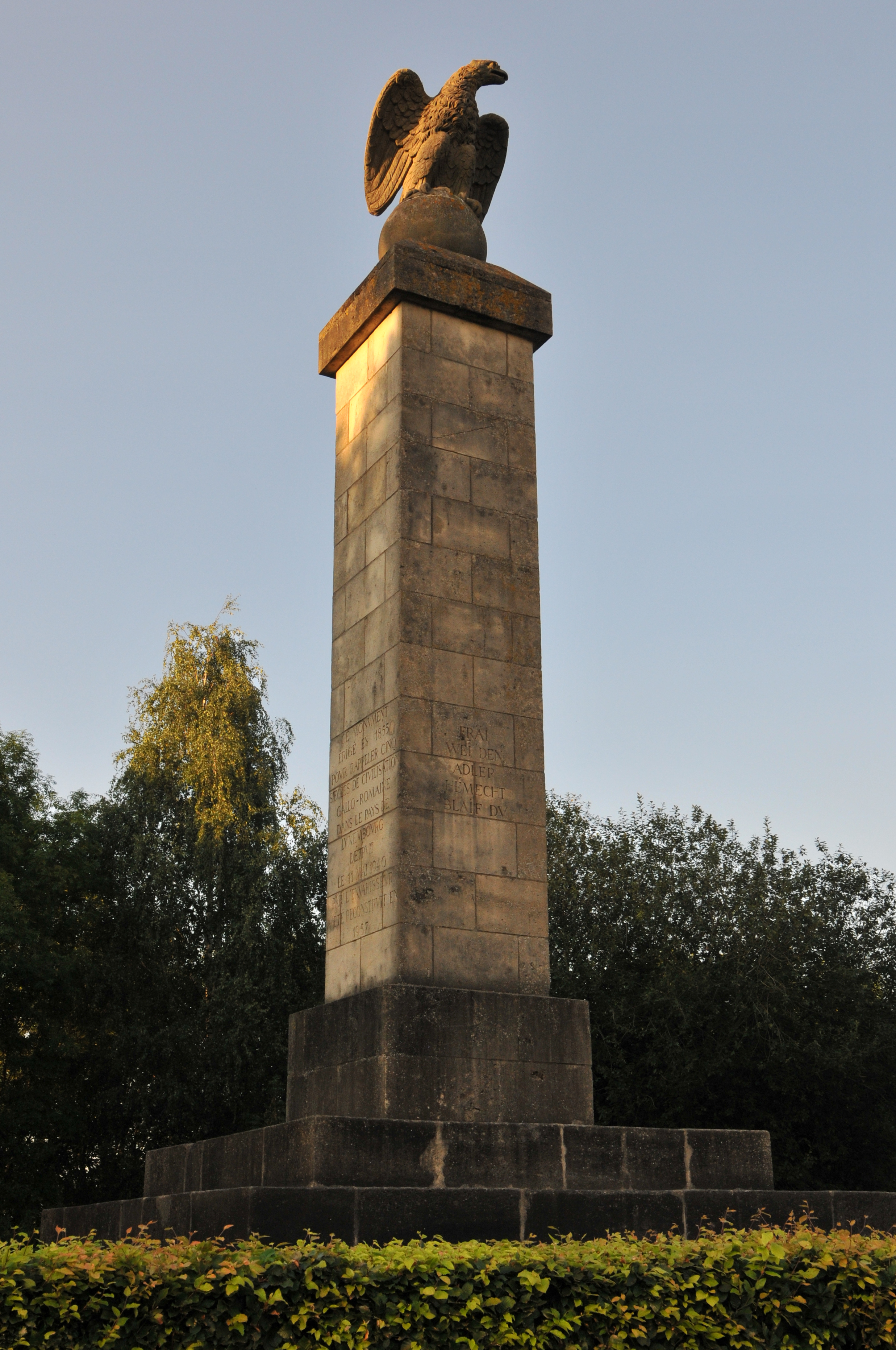 D'Réimermonument zu Duelem.